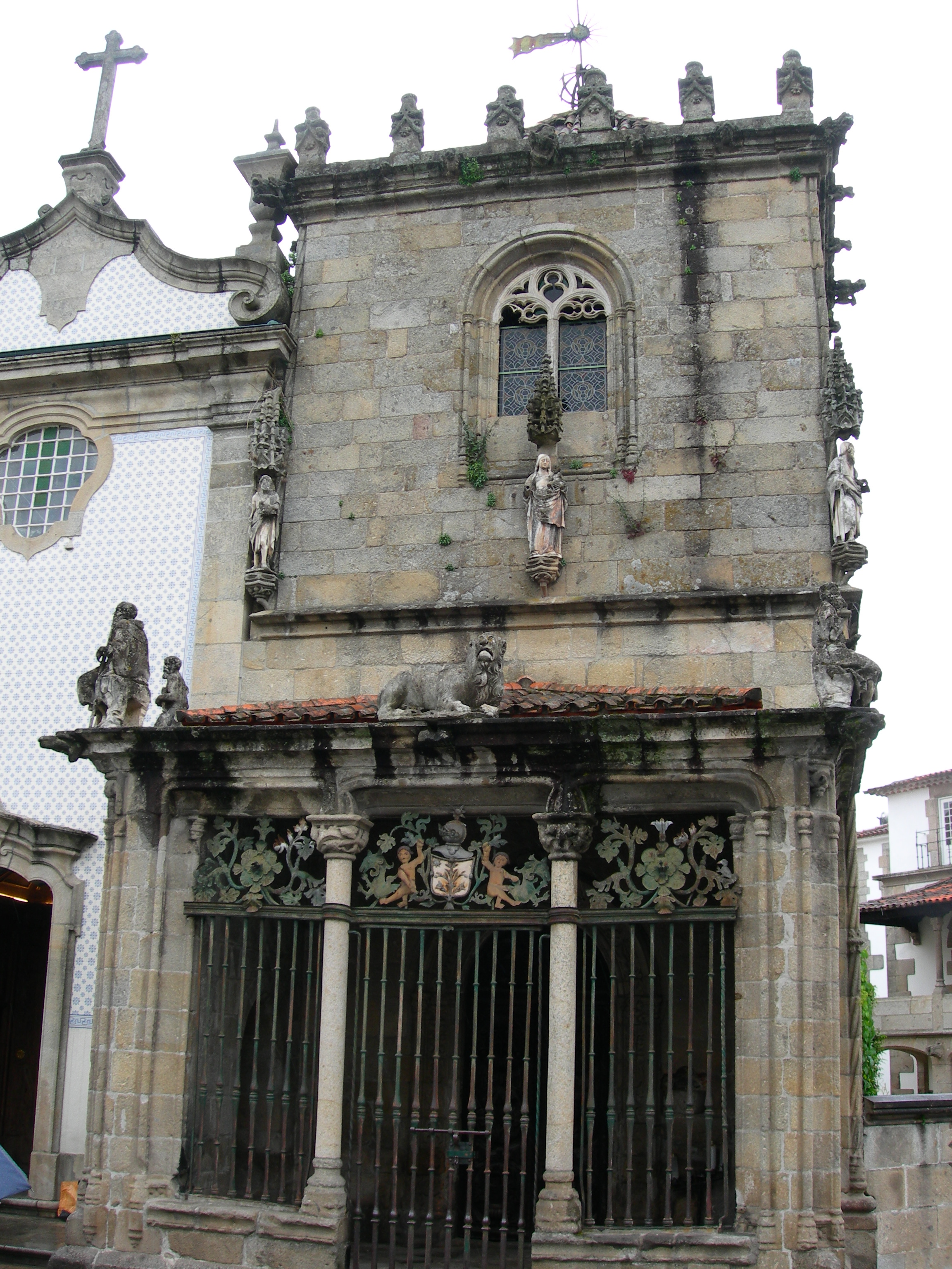 Capela dos Coimbras II